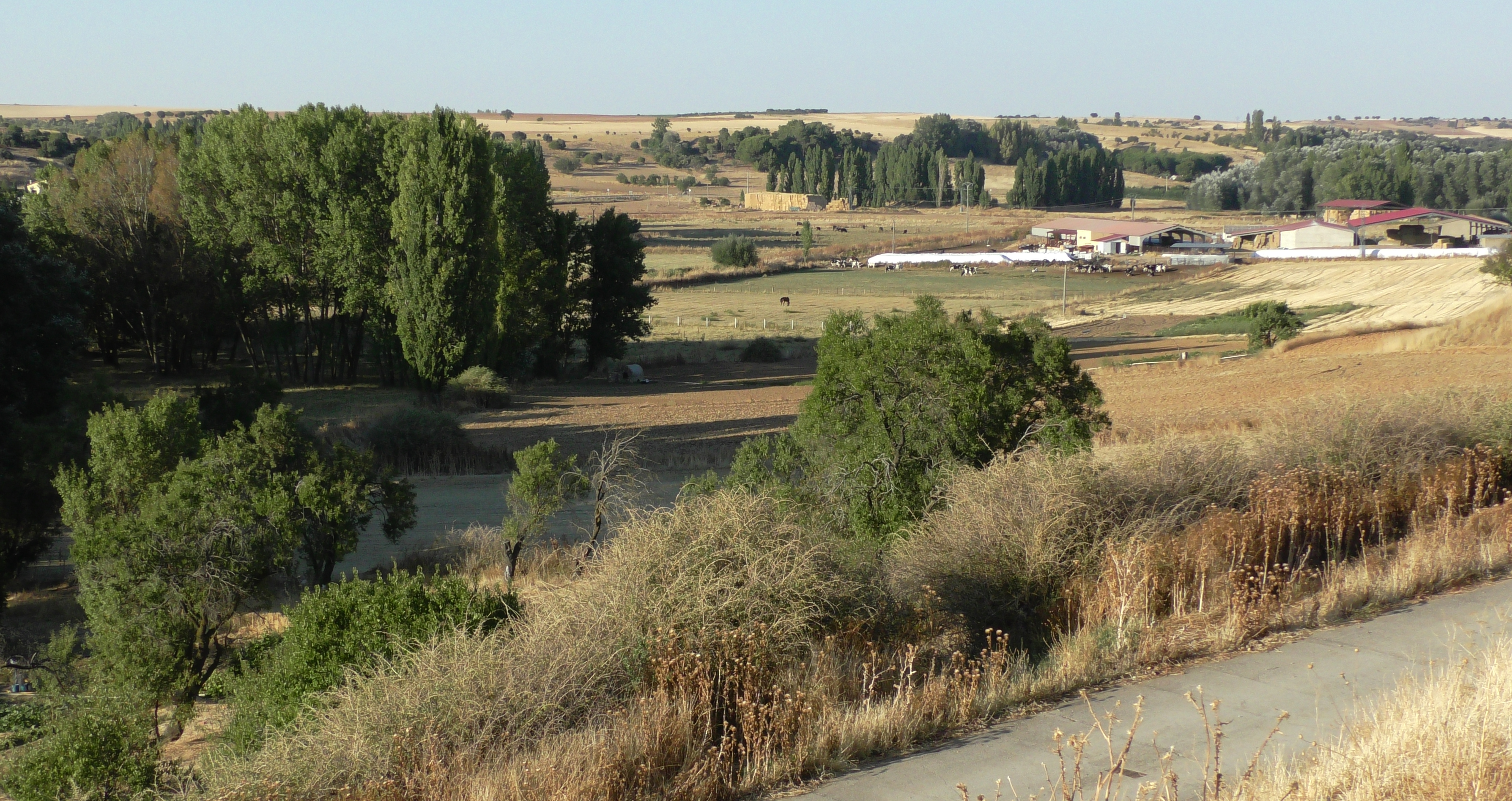 El Piñero